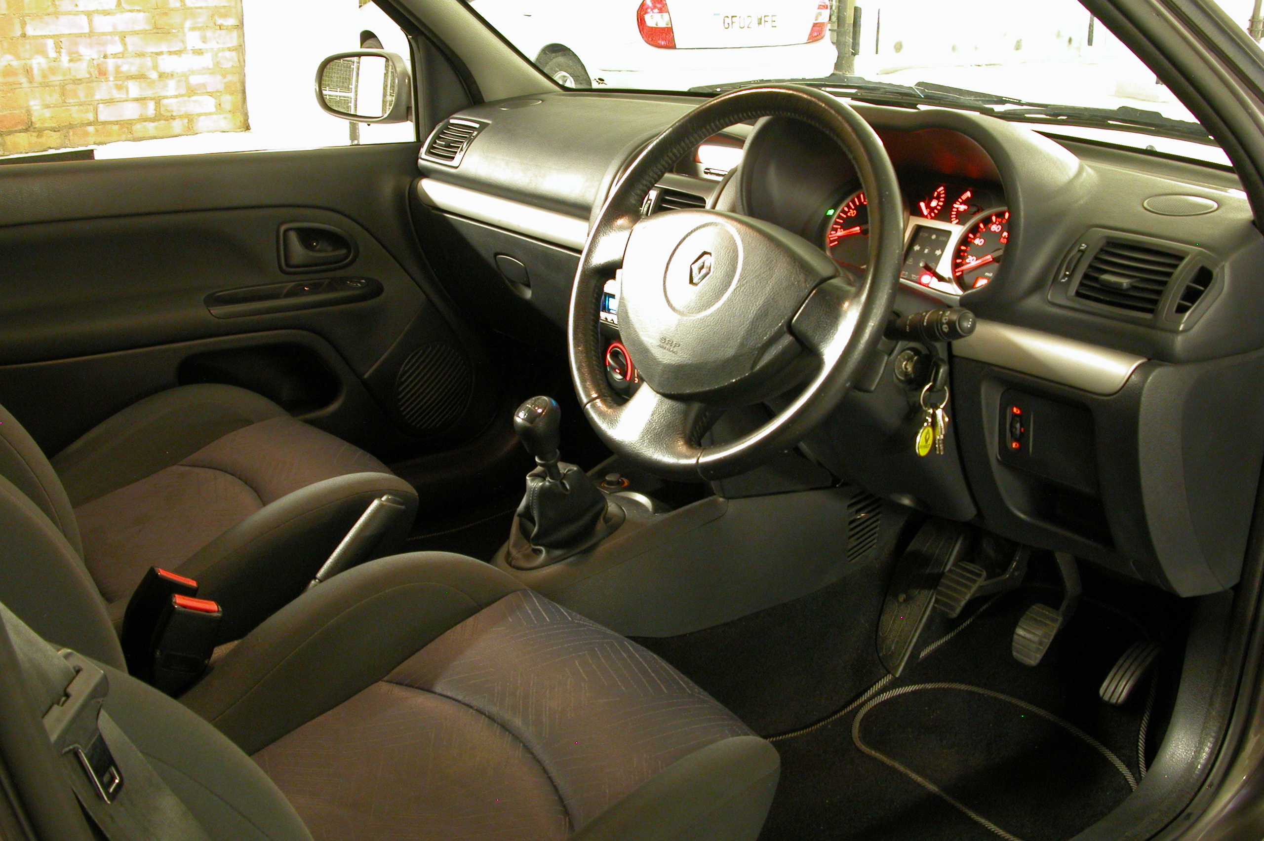 Intérieur d'une Renault Clio II 2 portes.